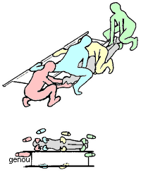 Image:Translation lifting with 4.png Relevage d'une victime avec un pont néerlandais à quatre secouristes. Illustration du haut : vue de trois-quart plongée ; illustration du bas : vue de dessous, avec les positions des mains et des pieds. Auteur : Christophe Dang Ngoc Chan (Cdang), dessin original numérisé et retouché par un logiciel graphique.